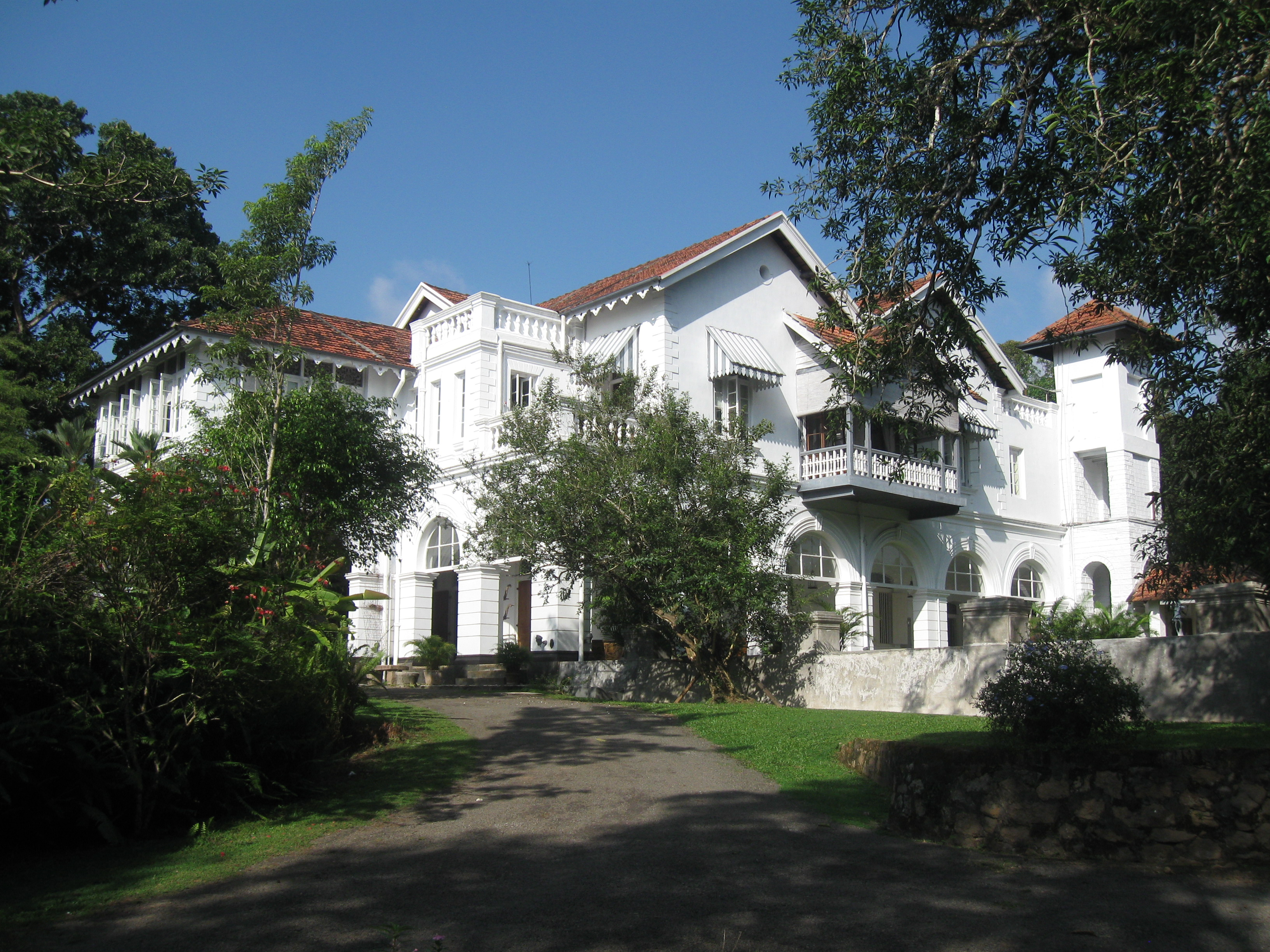 Photograph of Horagolla Walauwa, Atthanagalla, Sri Lanka